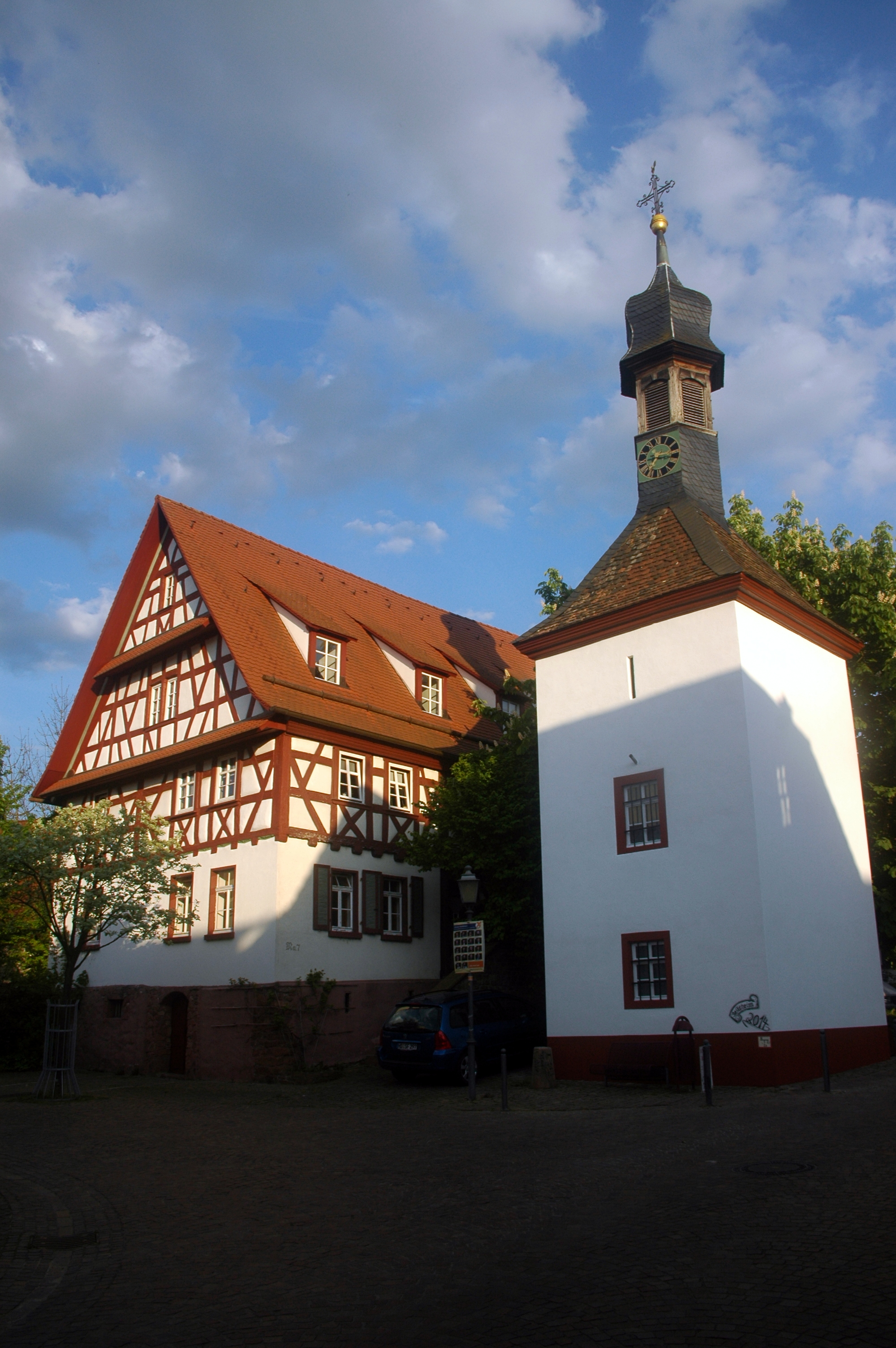 Reilsheimer Dörndl